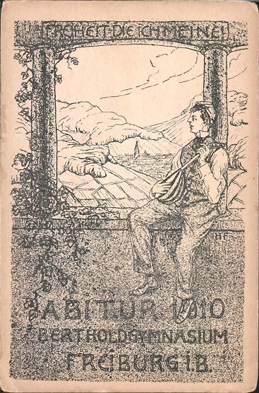 Postkarte Freiheit, die ich meine. Abitur 1910. Bertholdgymnasium Freiburg i.B.